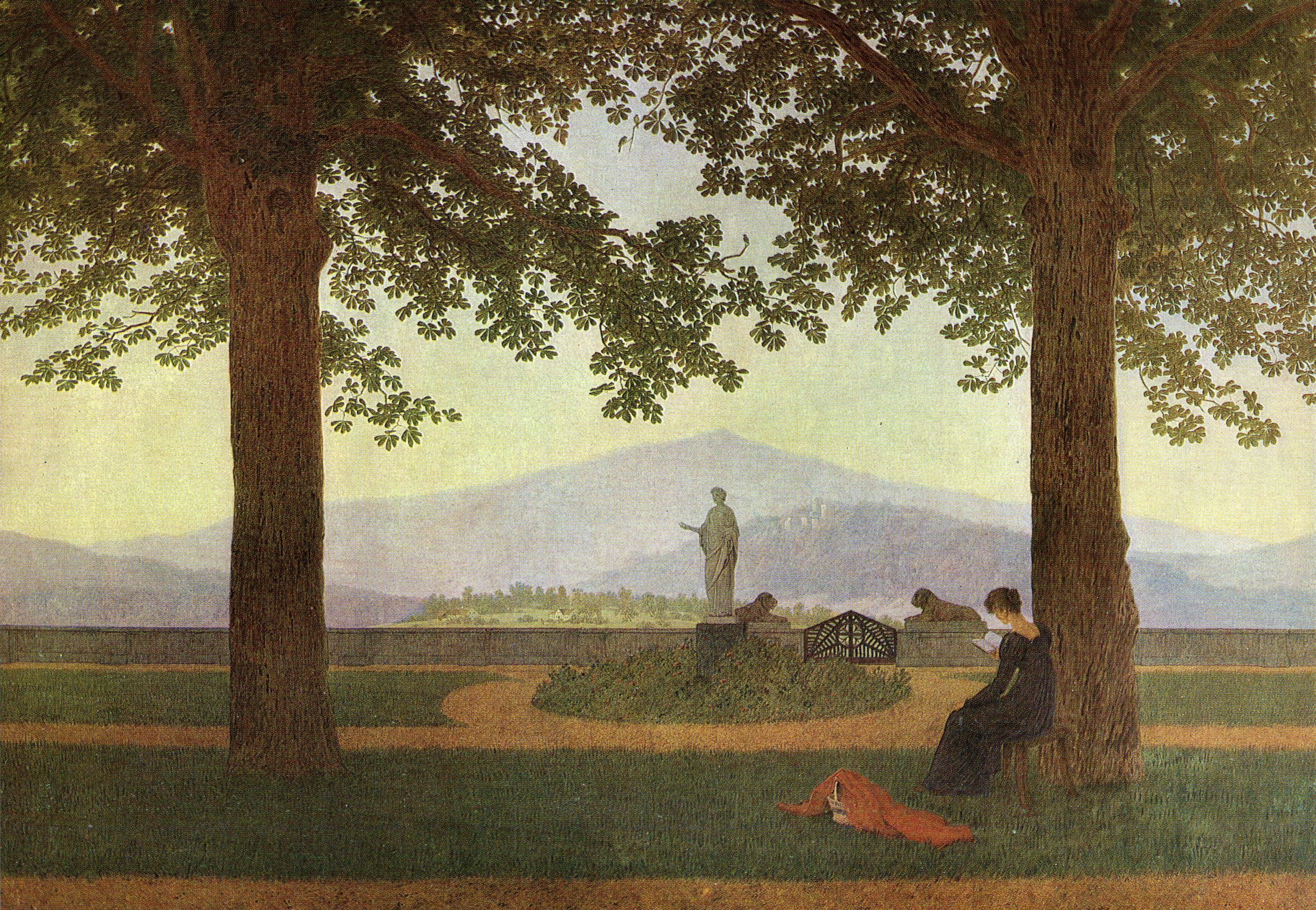 (Schlossterrasse, im 19. Jahrhundert Terrasse des Schlosses Erdmannsdorf angenommen)